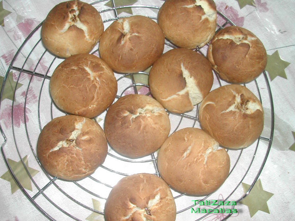 macatias préparés par TatiZaza